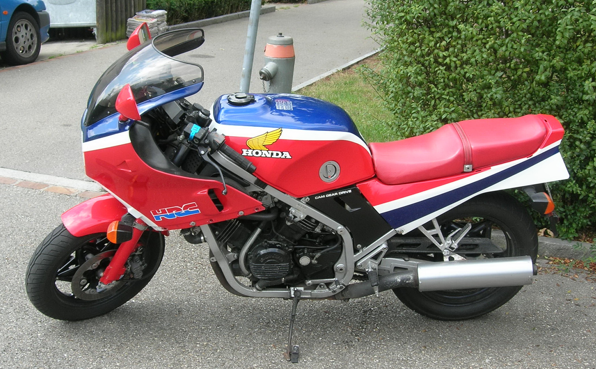 Honda VF 1000 R, Jahrgang 1985